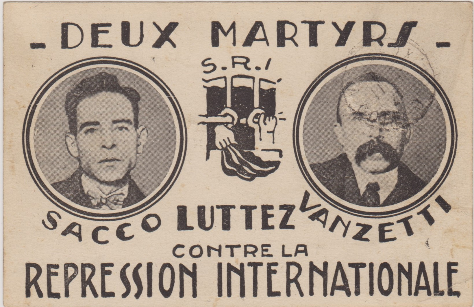 Carte postale éditée en 1927 en France par le Secours rouge international, en appui à la campagne de soutien à Sacco et Vanzetti.